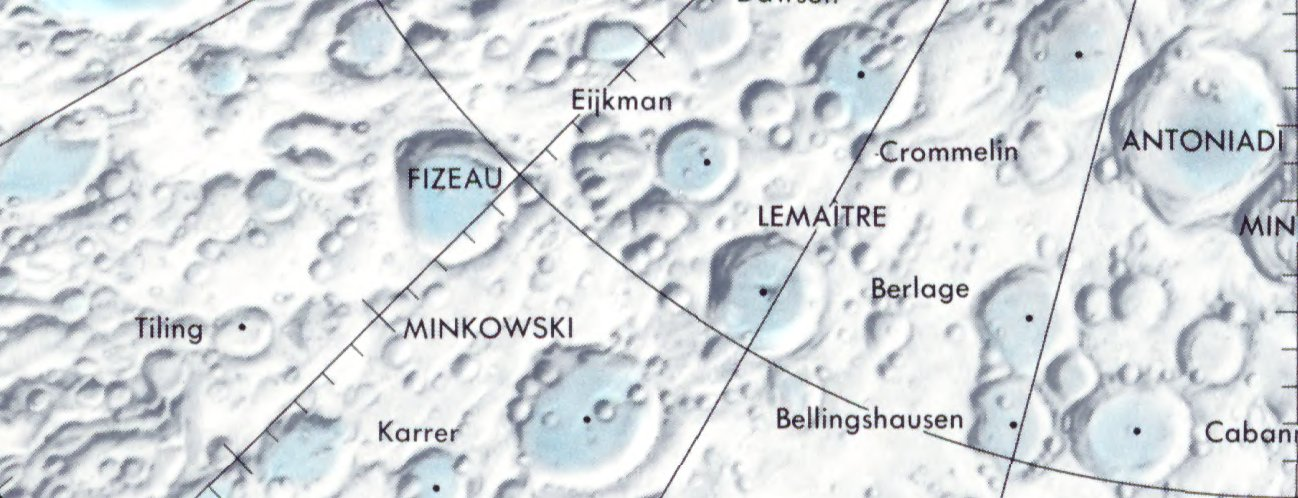 Cráter lunar Tiling. Localización. (Lunar Chart LPC1. Second Edition)